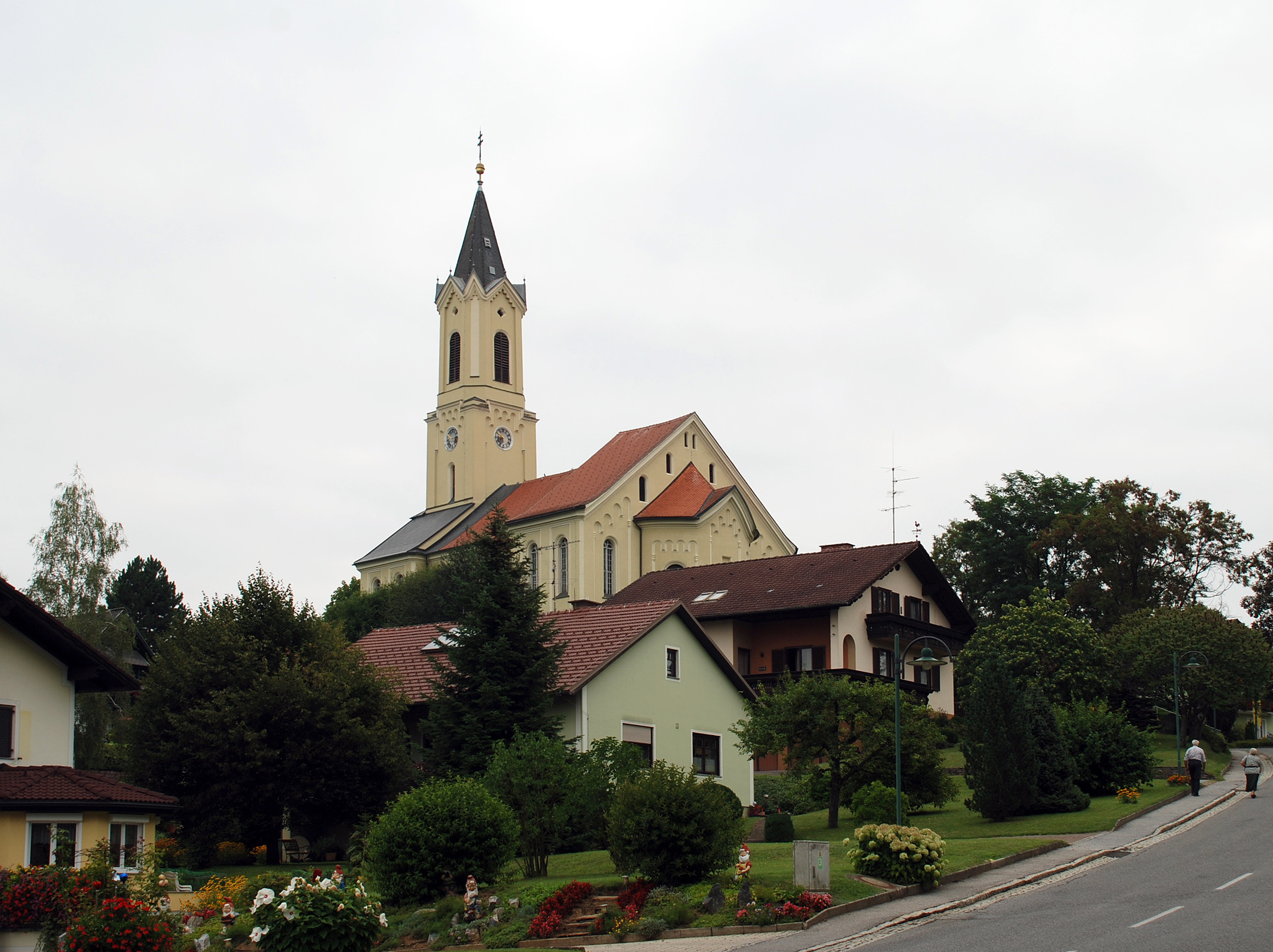 St. Josef, Weststeiermark, Österreich: Pfarrkirche St. Josef